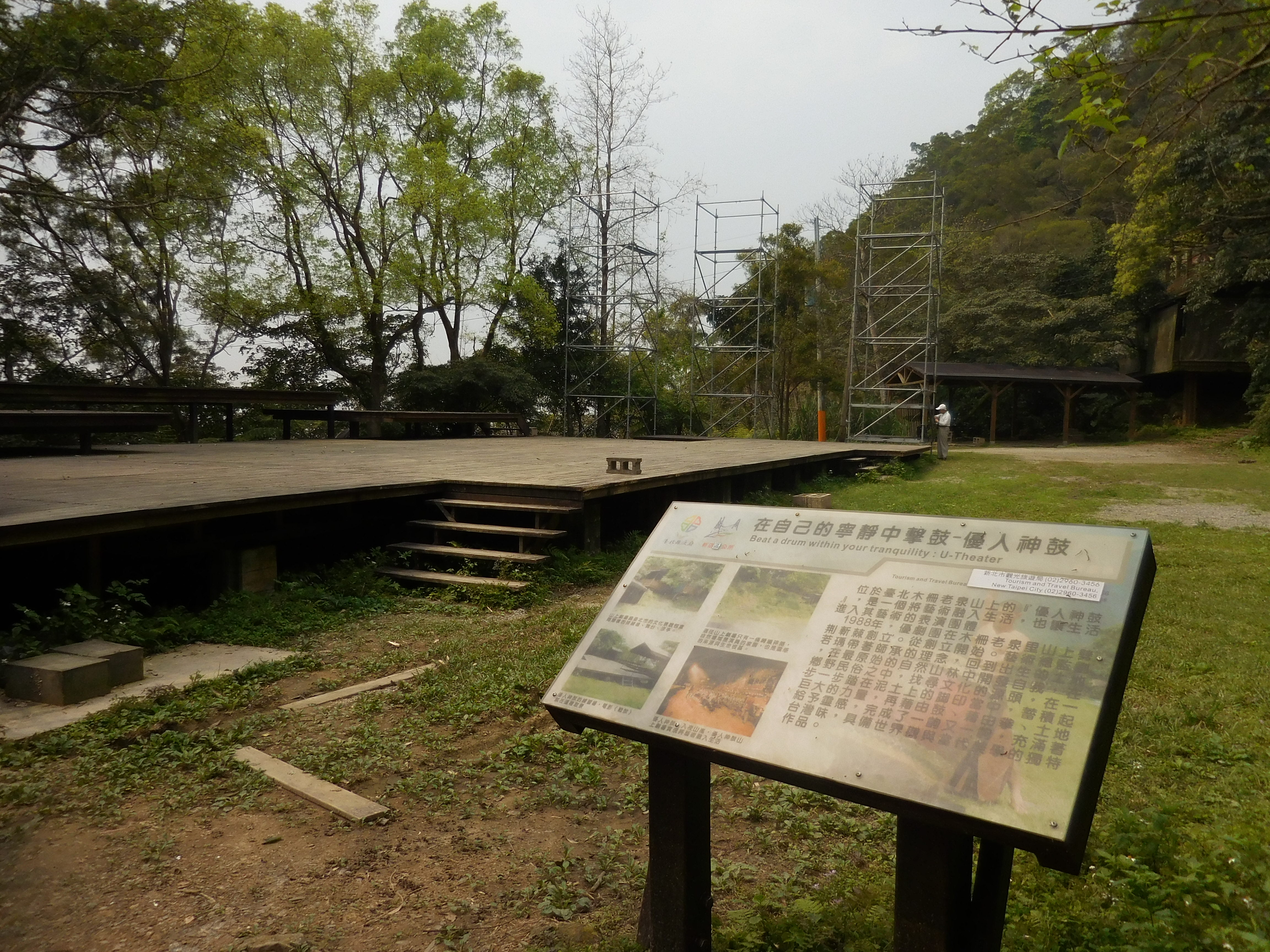 優人神鼓山上劇場如同少林寺的環境，讓優人神鼓暨表演36房少林拳